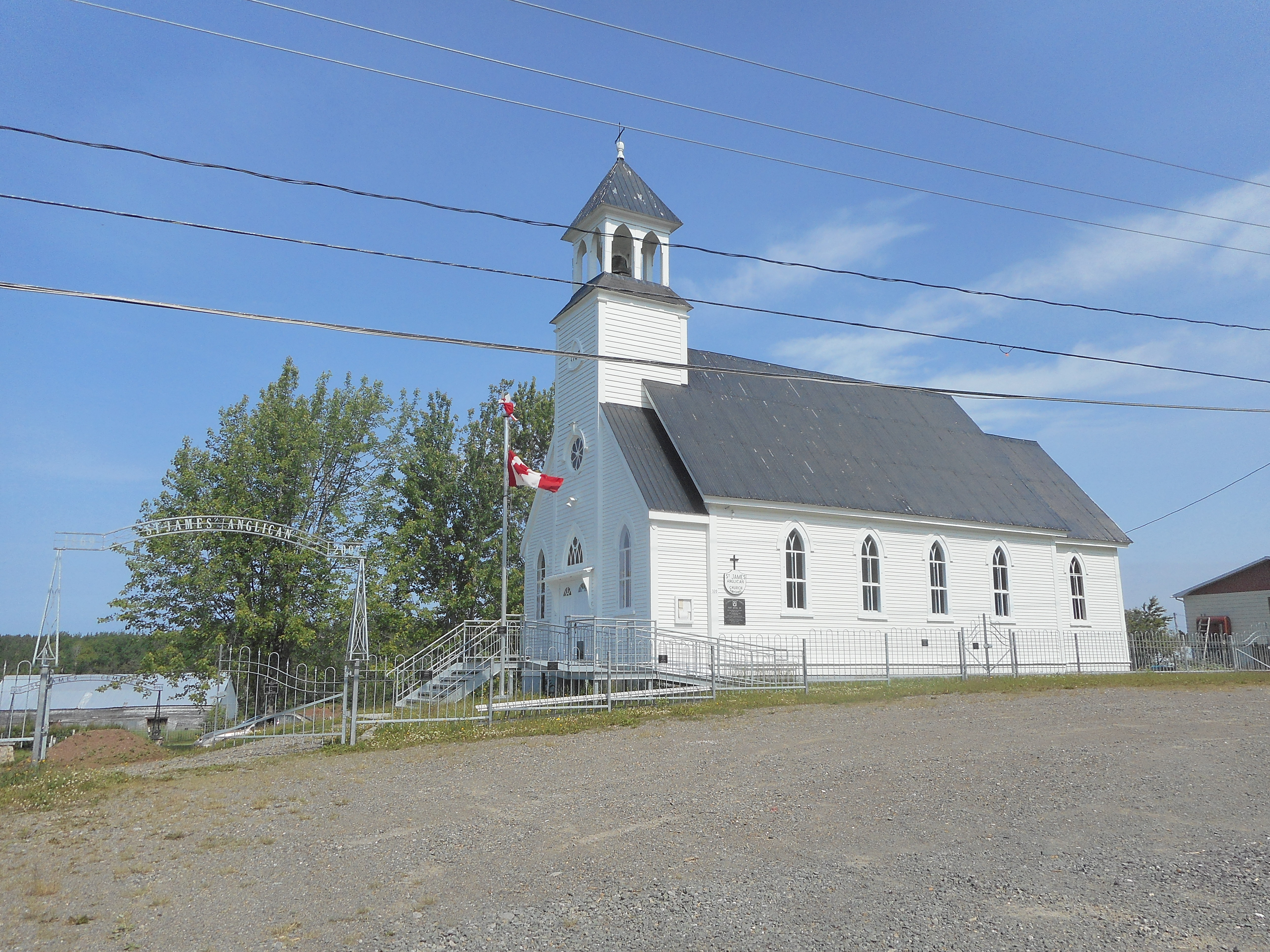 Église Saint-James (autre nom : Saint James Anglican), route 132, Port-Daniel–Gascons, Québec